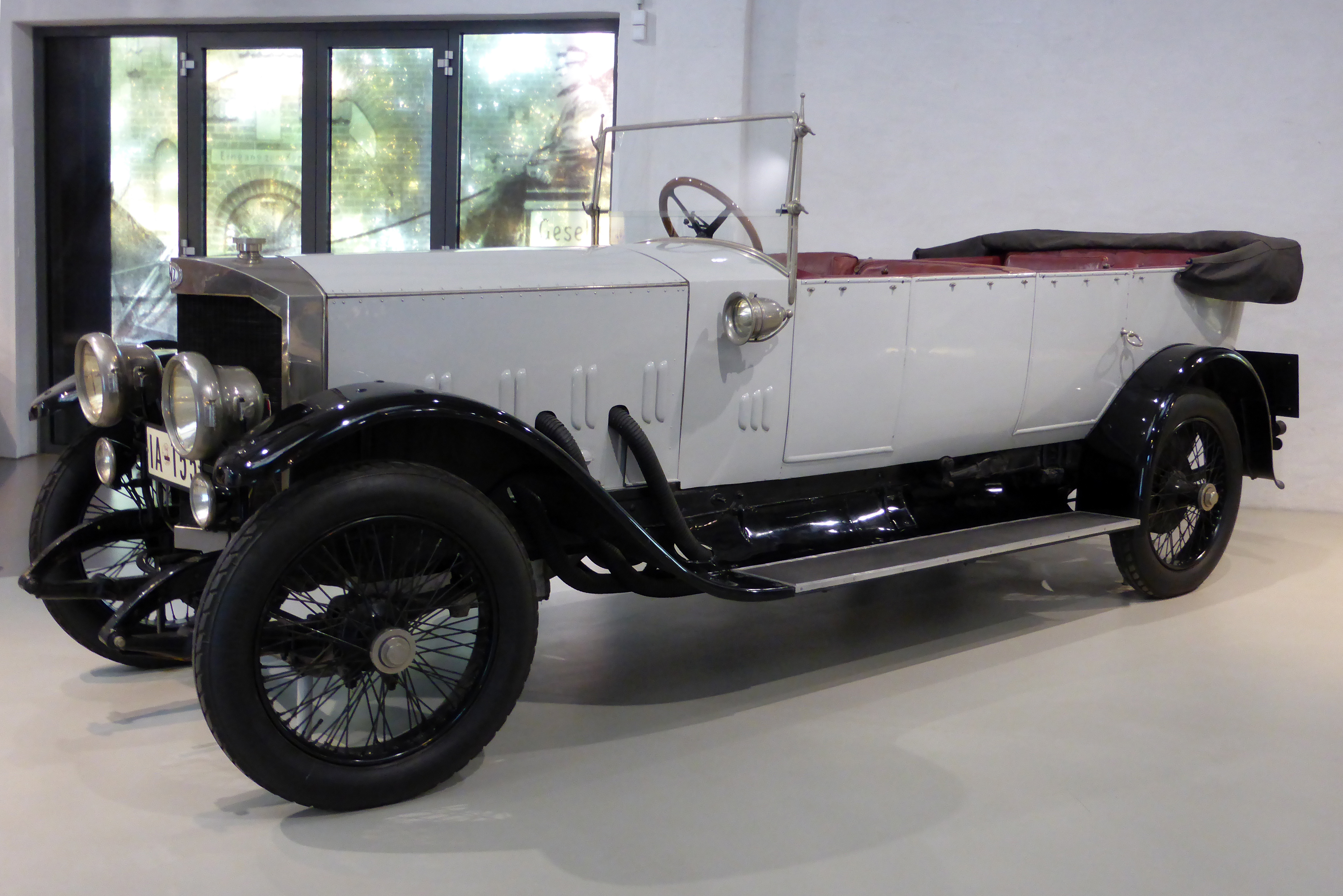 Benz, 21/50 PS, Baujahr 1914 (Typ E3) Sonderanfertigung der Karosseriebaufirma Josef Neuss in Berlin-Halensee für Karl Max von Lichnowsky im Deutschen Technikmuseum in Berlin. Wikipedianische KulTour am 10. Oktober 2015 in der Ausstellung des Museums.